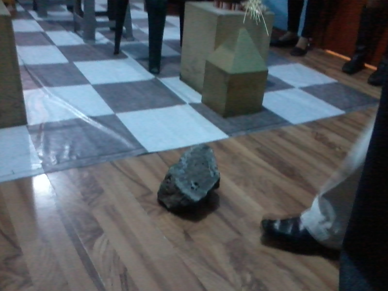 Ceremonia de aumento de salario (paso del grado de aprendiz al grado de compañero) en una logia del Rito Nacional Mexicano (masonería, México, D.F.)